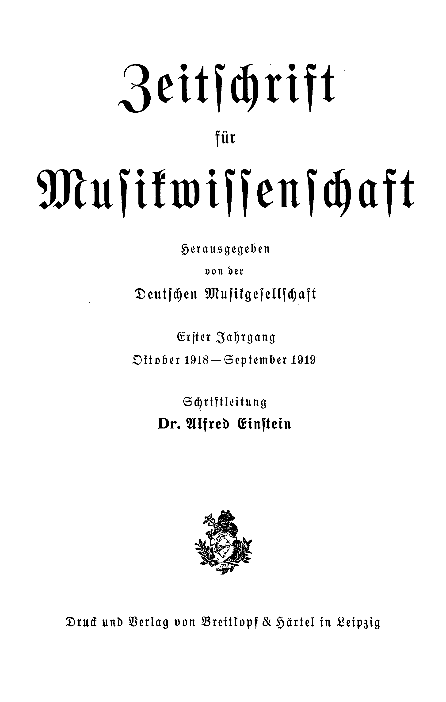 Titelseite der Zeitschrift / Title page of the periodical